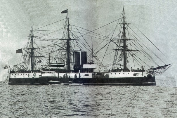 Encouraçado Riachuelo (1880) Marinha do Brasil- Naval ship of Brazil.